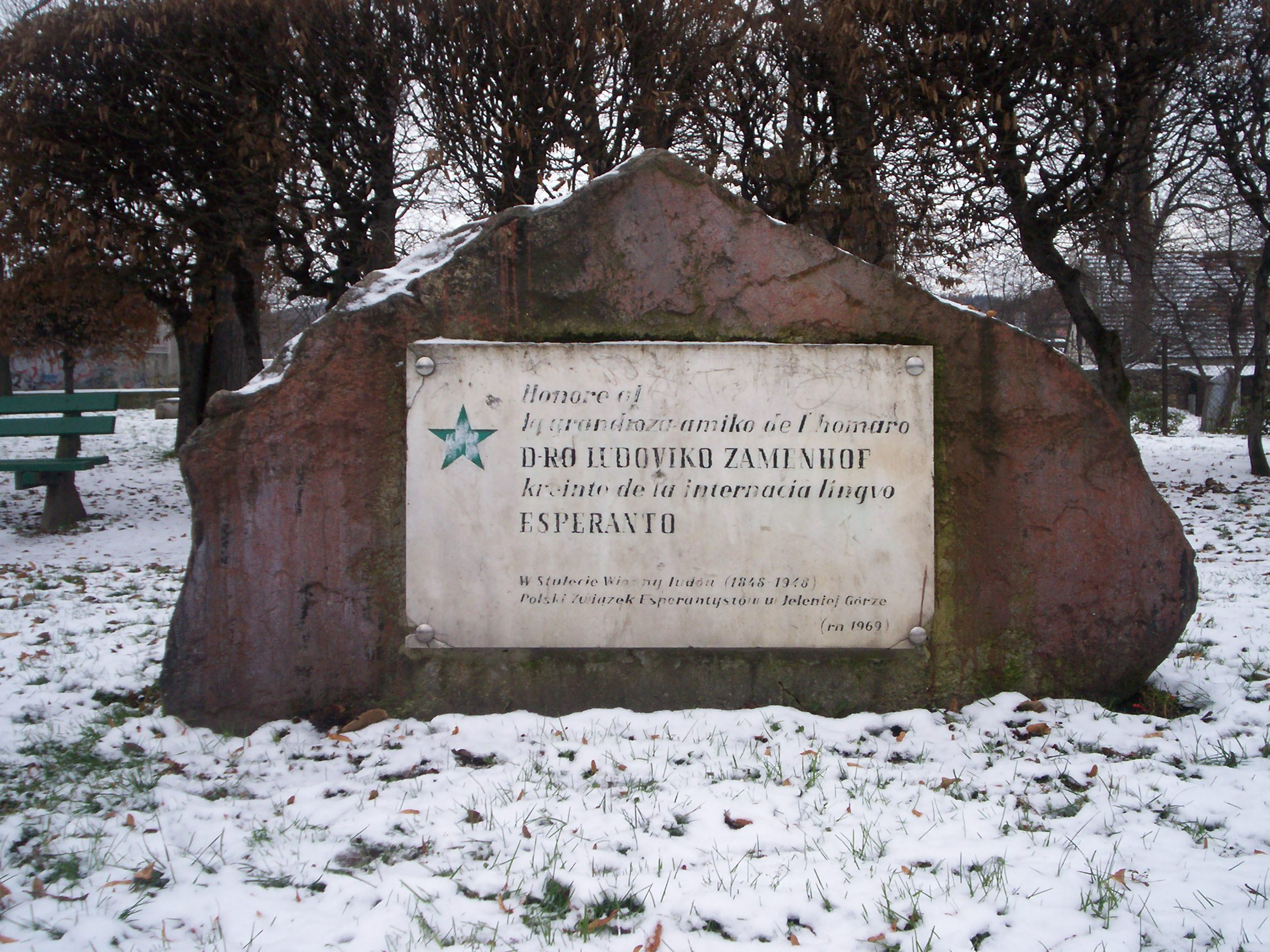 Tablica pamiątkowa w Jeleniej Górze poświęcona Ludwikowi Zamenhofowi, twórcy języka esperanto.